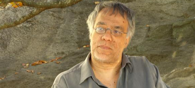 Fausto Fawcett (nome artístico de Fausto Borel Cardoso, Rio de Janeiro, 10 de maio de 1957) é um jornalista, autor teatral, escritor de ficção científica e compositor brasileiro.